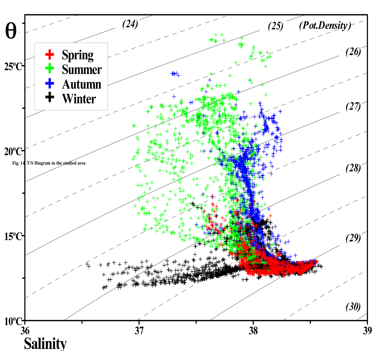 Diagrama TS de la Mediterrània Noroccidental